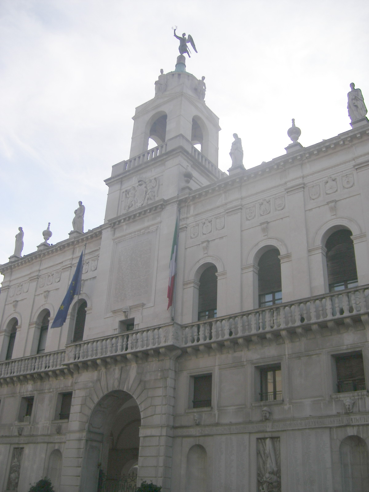 Padova